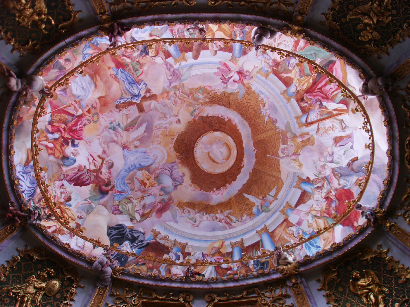 Weltenburg abbey